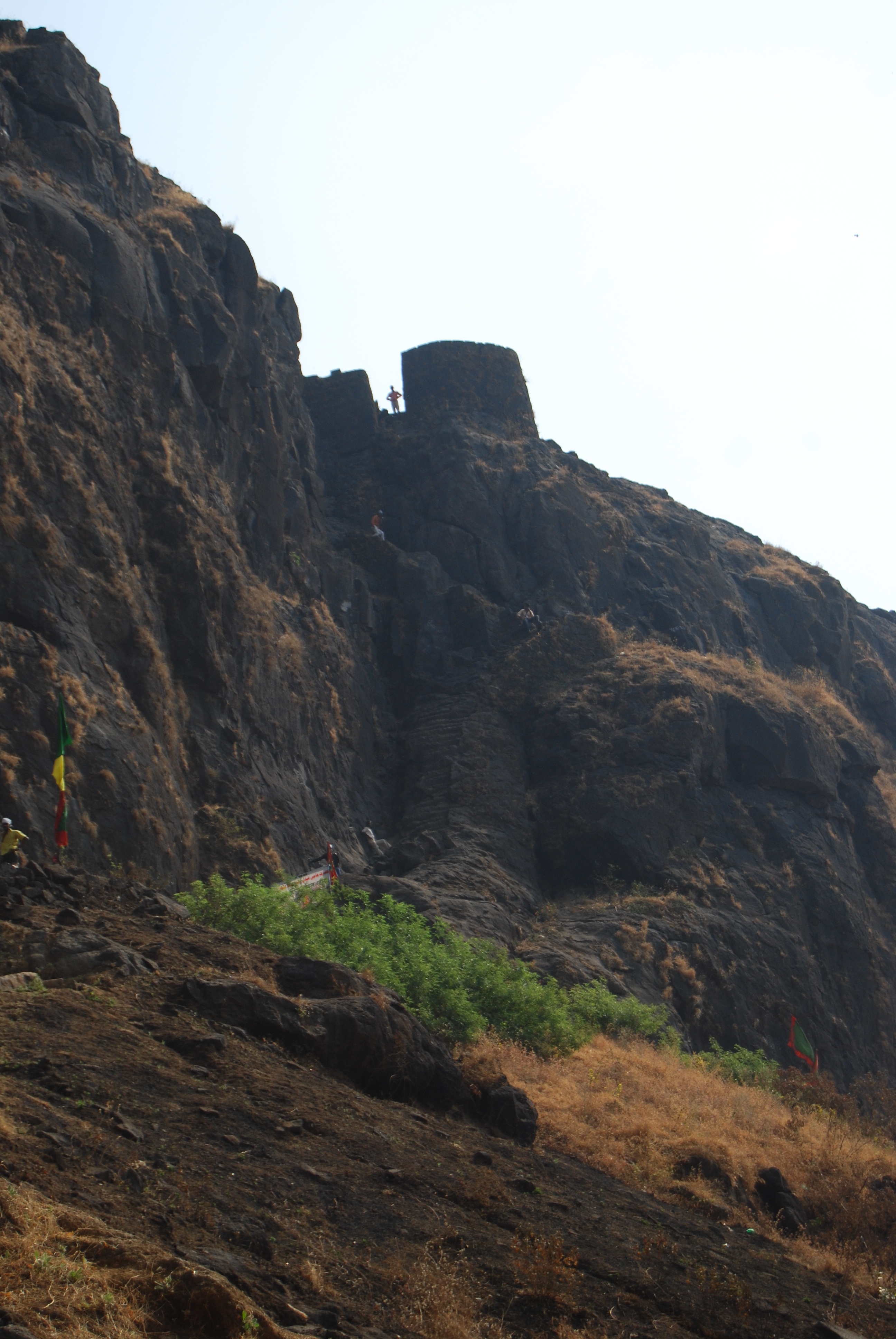 Malanggad